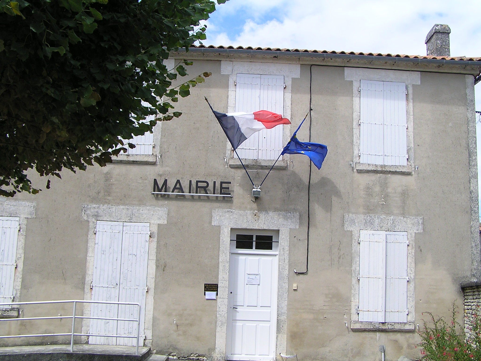 mairie de Villejoubert (16), France